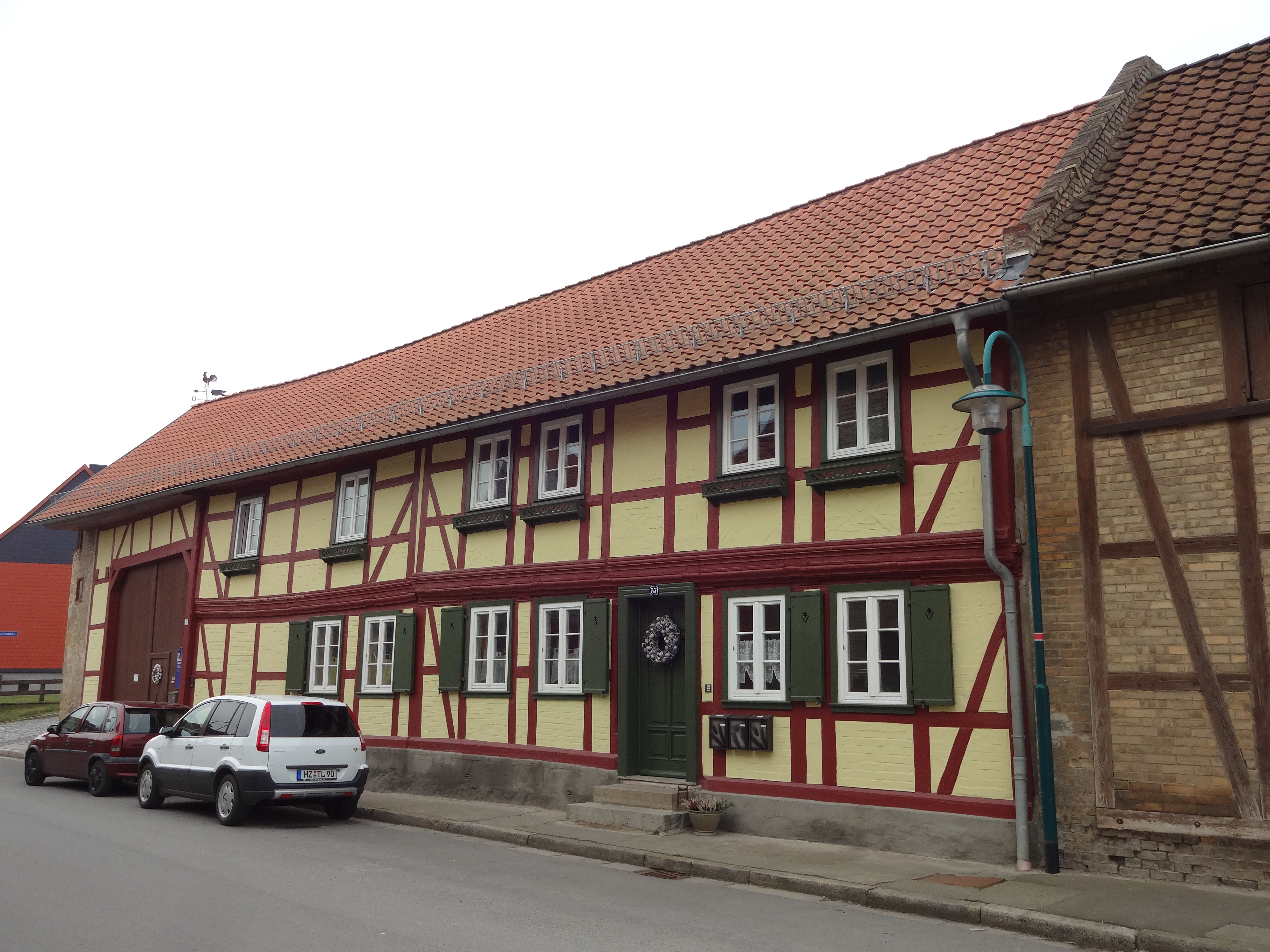 denkmalgeschütztes Fachwerkhaus (Ackerbürgerhof) in der Kornstraße 57 in Derenburg, Ortsteil von Blankenburg (Harz)